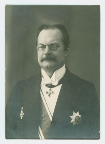 Яков Фридрихович Озе (1860-1919), российский латышский философ.